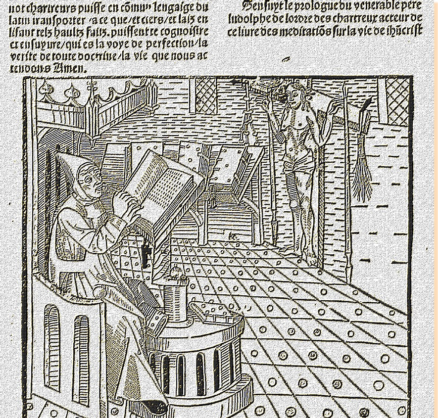 Ludolphe le Chartreux.